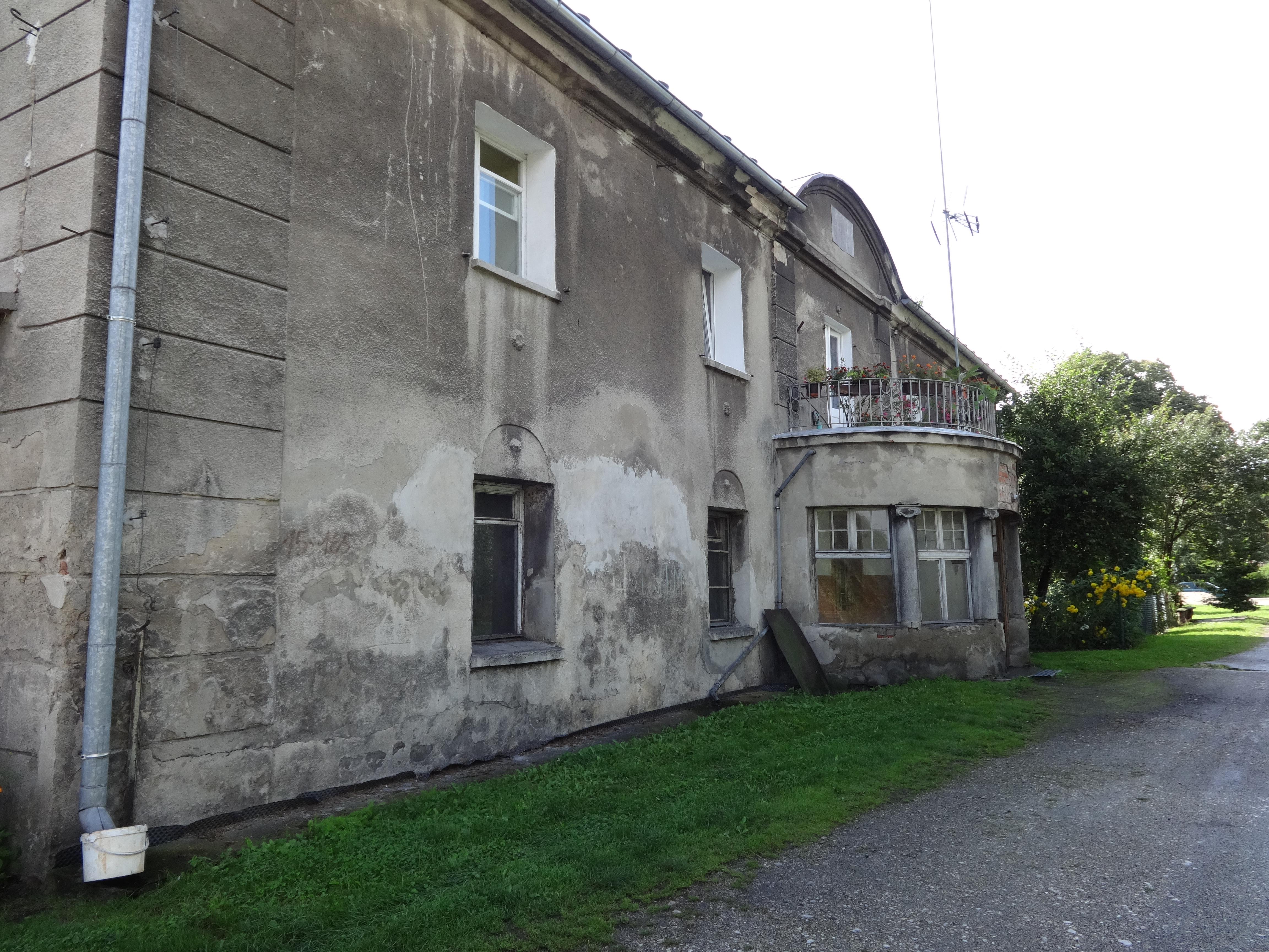 Maciejowice, dwór, ob. dom nr 10c, 1589, kon. XVIII